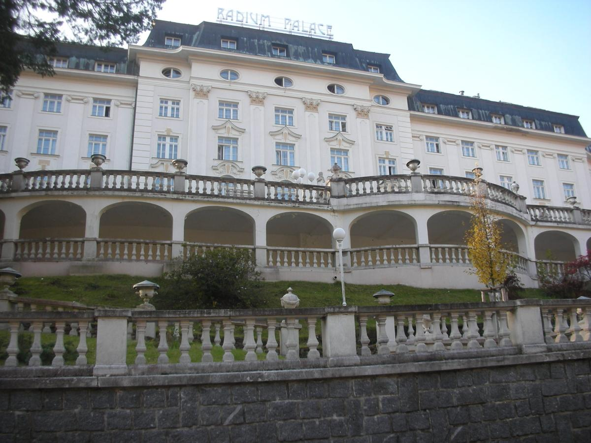 Palast-Hotel in Jachimov